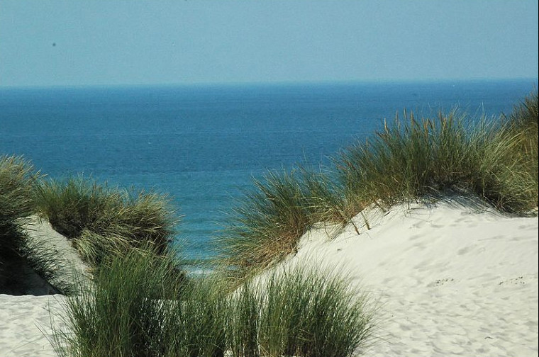 La plage de Stella plage à Cucq vue des dunes.